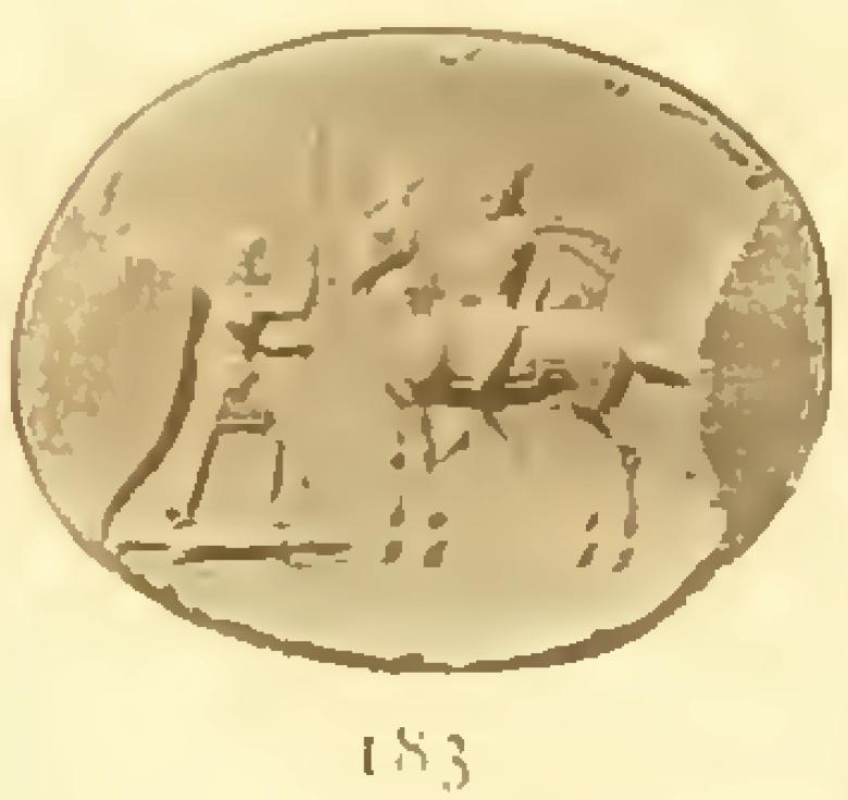 Schmuckstein